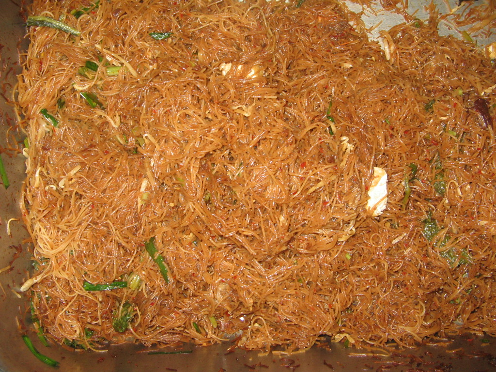 Mee Hoon Goreng 2005 @Mohamed Yosri